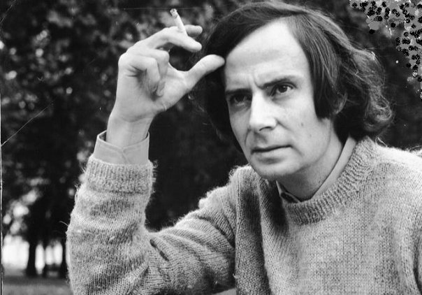 El notable actor ítalo-argentino en una fotografía del archivo familiar.